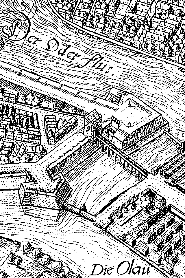 Fragment planu Wrocławia z 1591 roku, autorstwa Georgiusa Hayera numerem 9 oznaczona Brama Ceglarska (w osi dzisiejszej ulicy Purkyniego) na północ od bramy, nad brzegiem Odry, Bastion Ceglarski